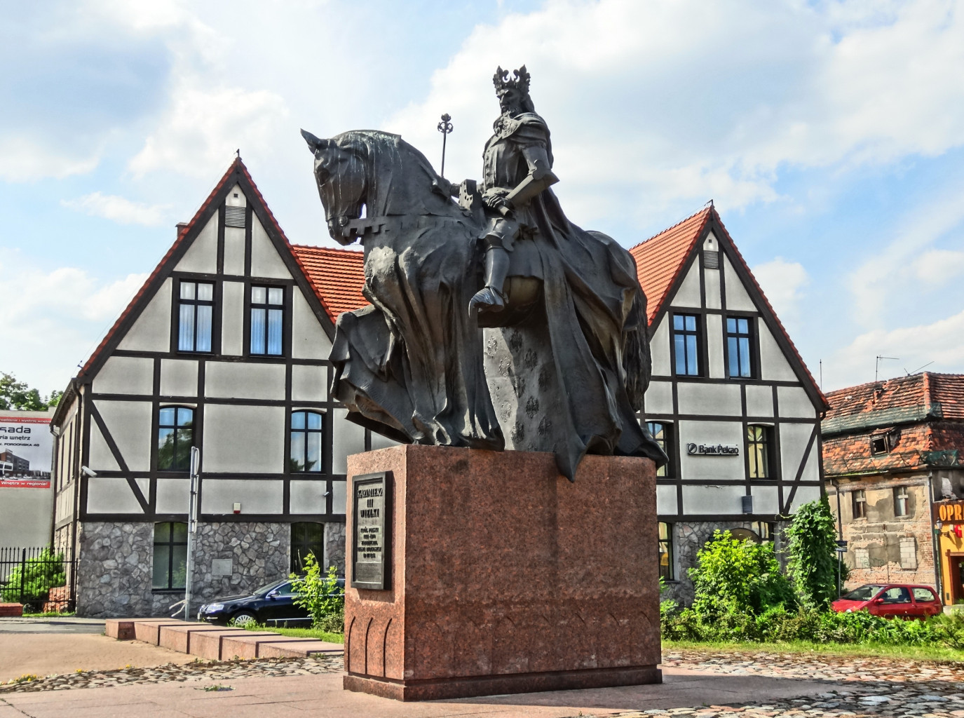 Pomnik króla Kazimierza Wielkiego w Bydgoszczy, odsłonięty w 2006 roku